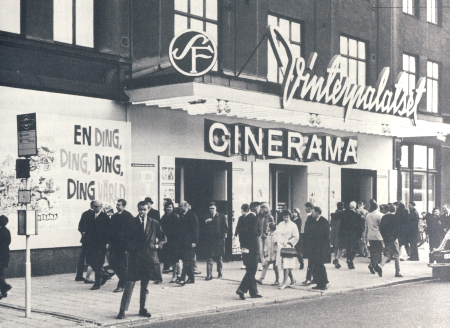 Biografen "Vinterpalatset" vid Norra Bantorget i Stockholm